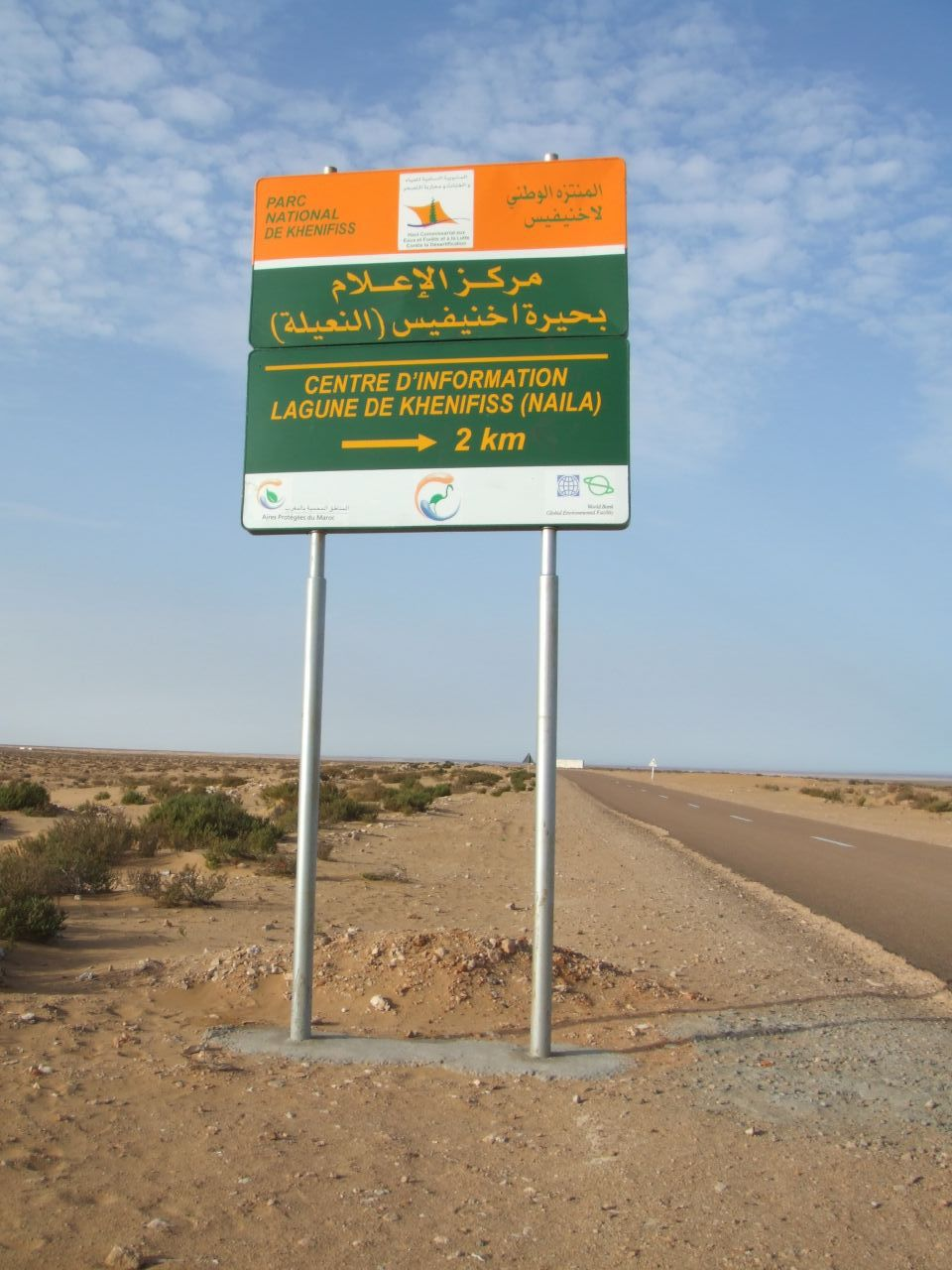 Panel del Parque Nacional Laguna de Khenifiss, cerca de Tarfaya, en Marruecos.